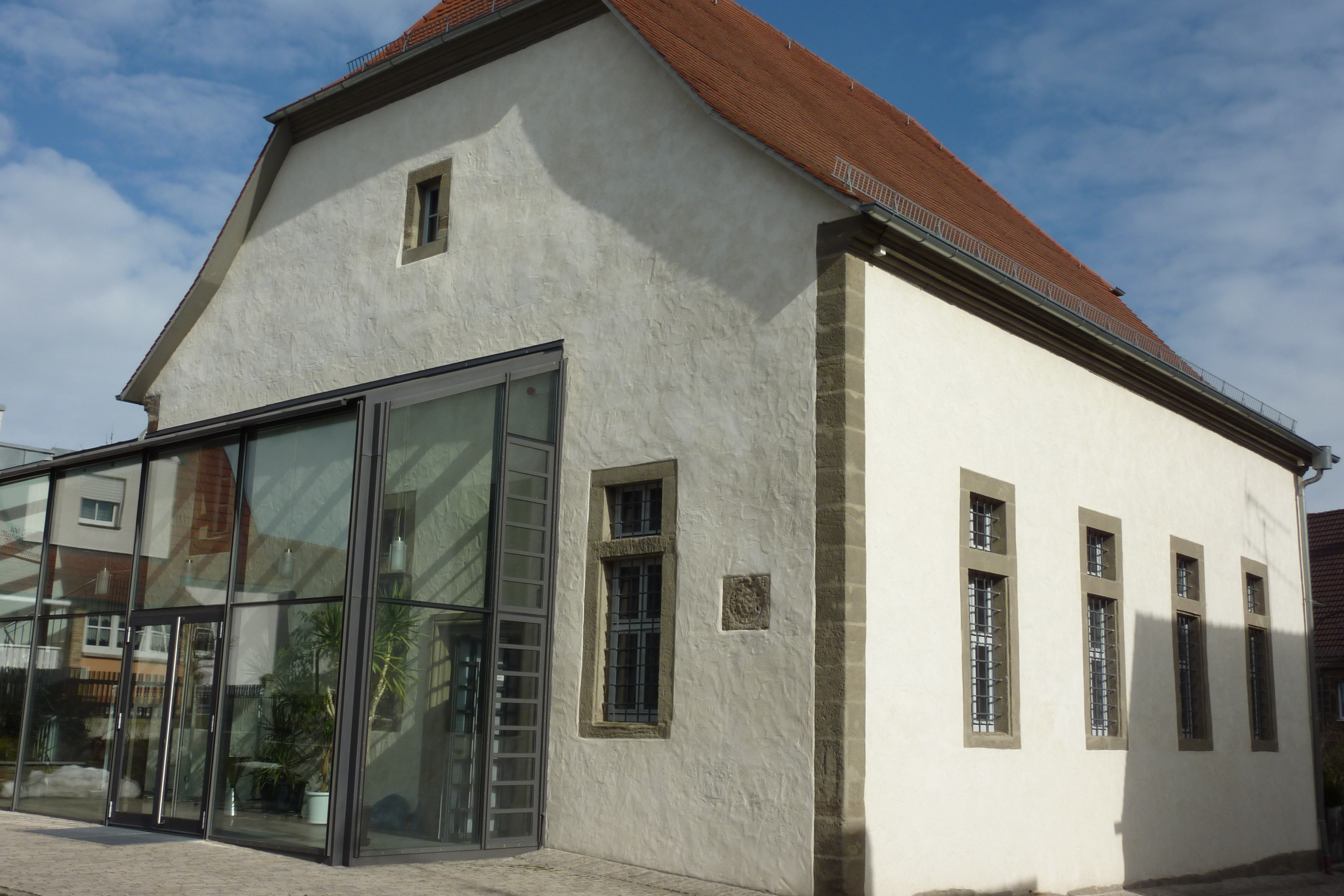 ehemalige Synagoge Reckendorf